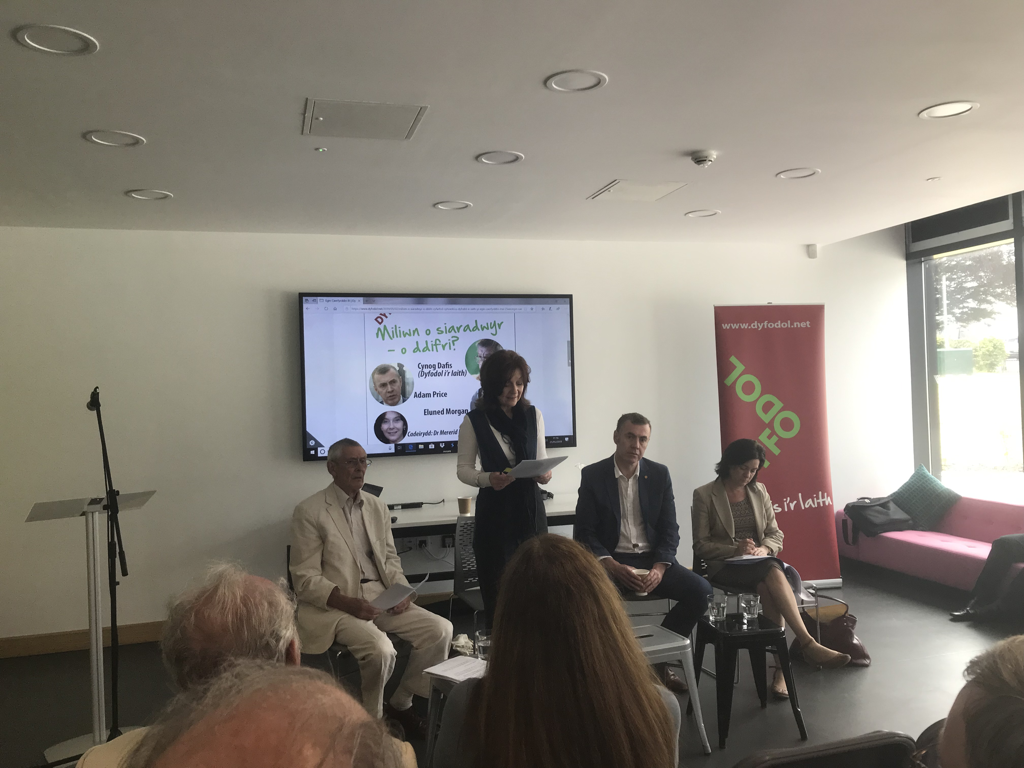 Mererid Hopwood cadeirydd y cyfarfod